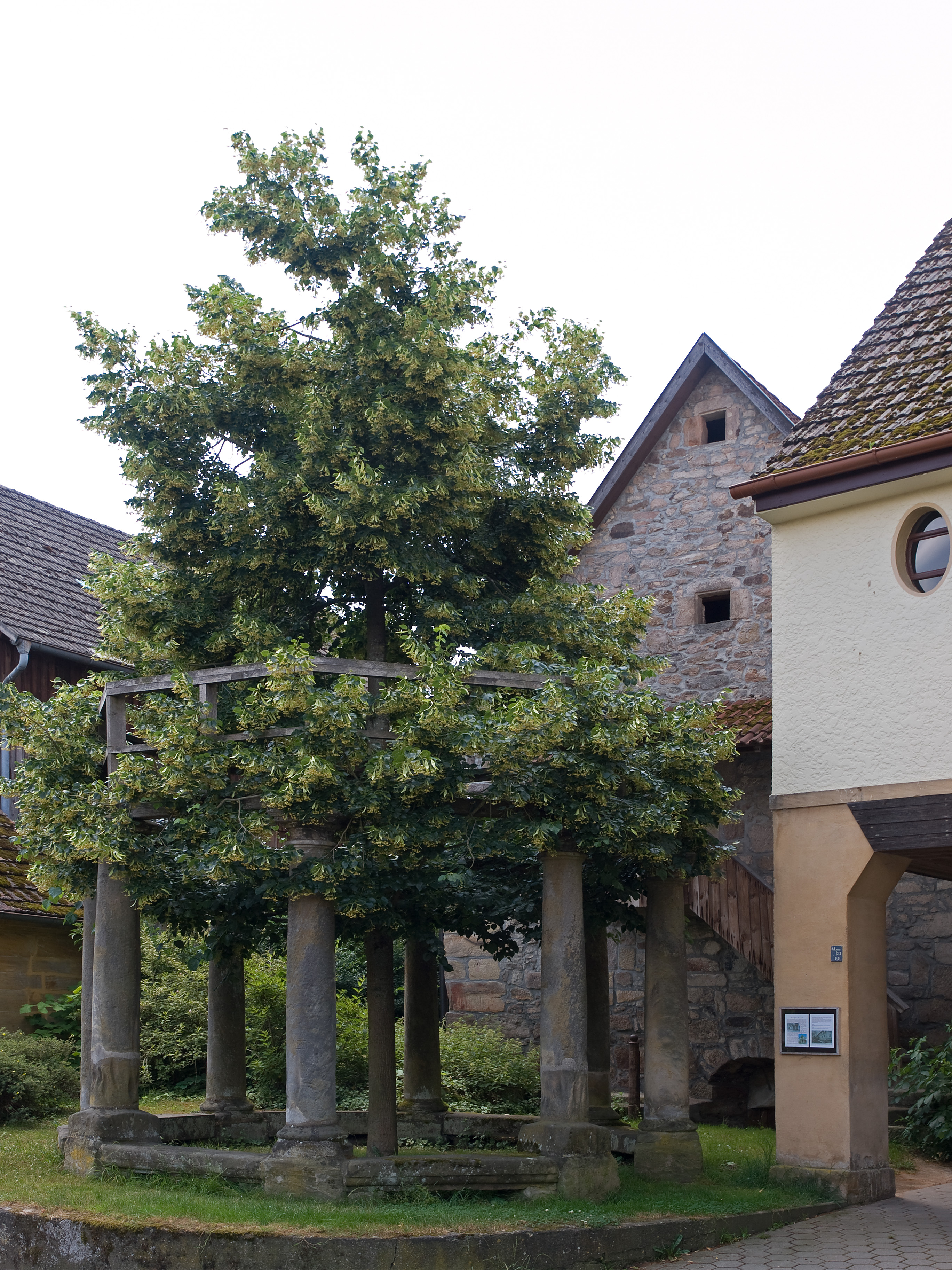 Tanzlinde in Langenstadt, Ortsteil von Neudrossenfeld